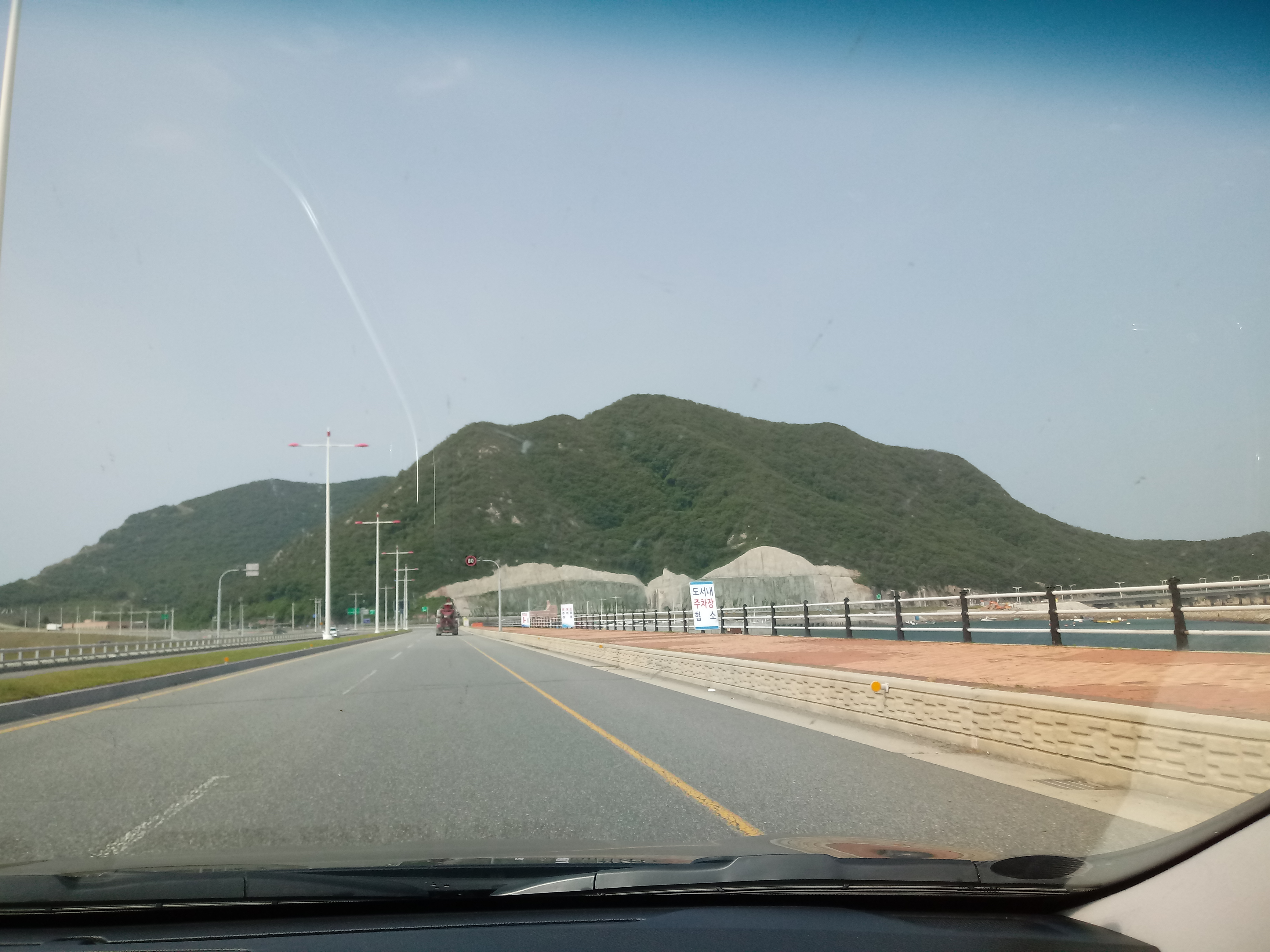 신시도와 야미도를 잇는 새만금 3호 방조제. 보이는 섬은 신시도. 야미도에서 신시도로 남쪽방향 촬영